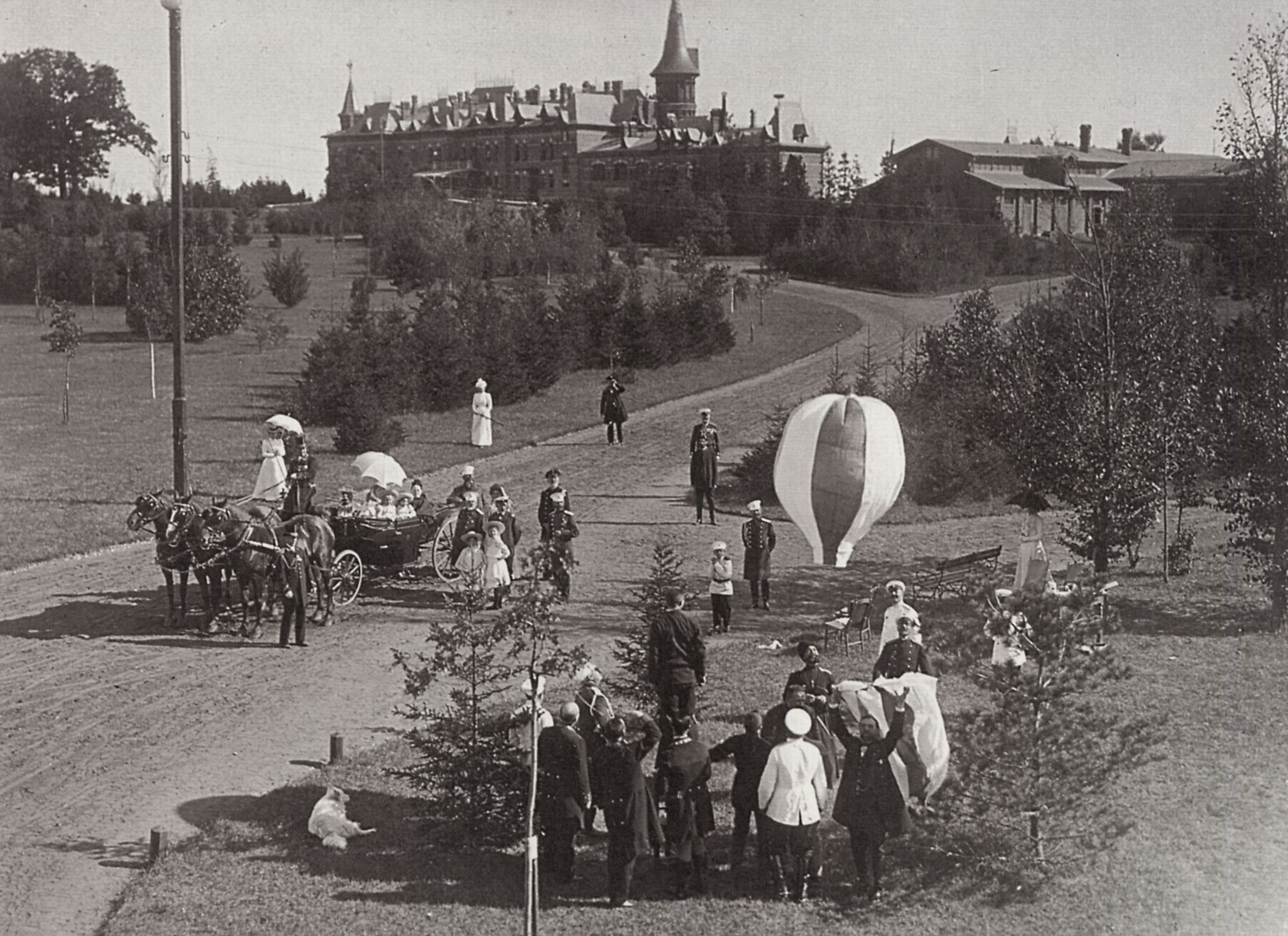 Hahn, K.E.: Carskoje Selo, die Sommerresidenz der Romanovs in der Nähe von St. Petersburg